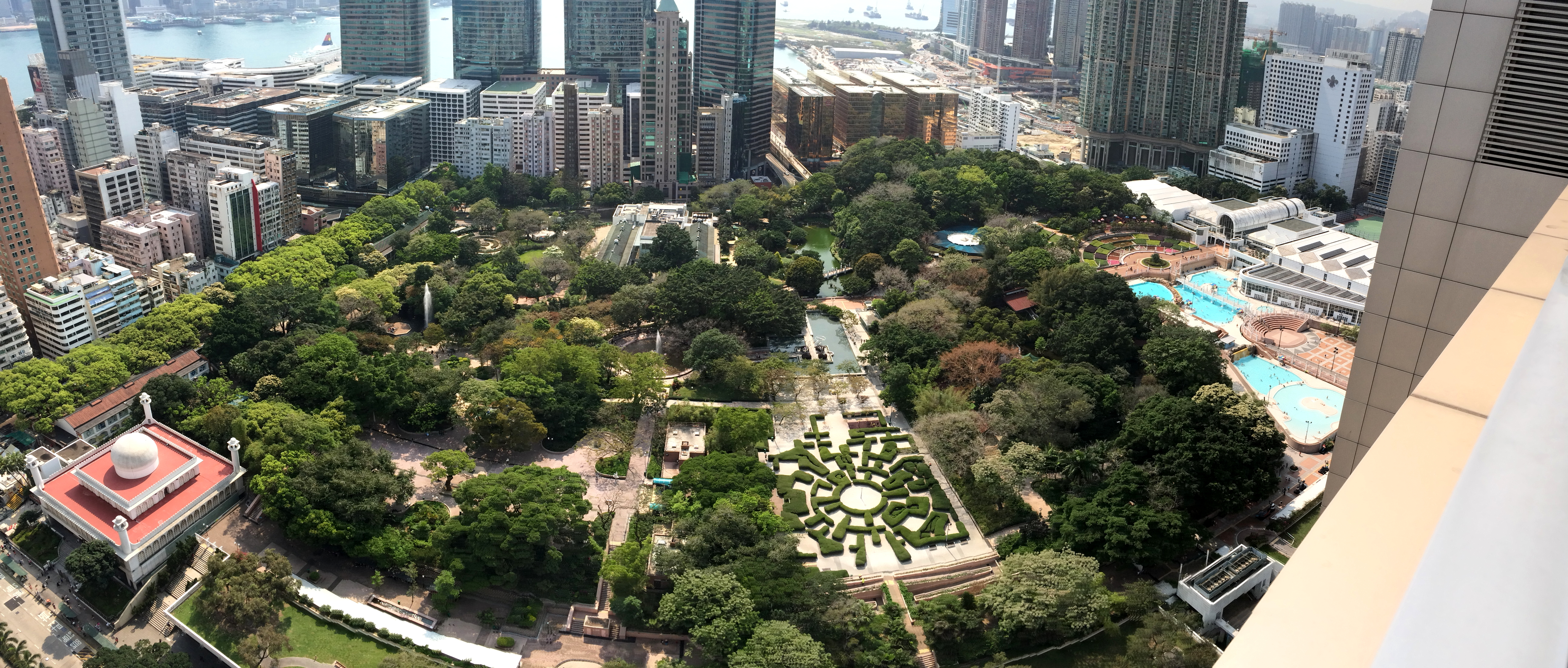 Kowloon Park Pano